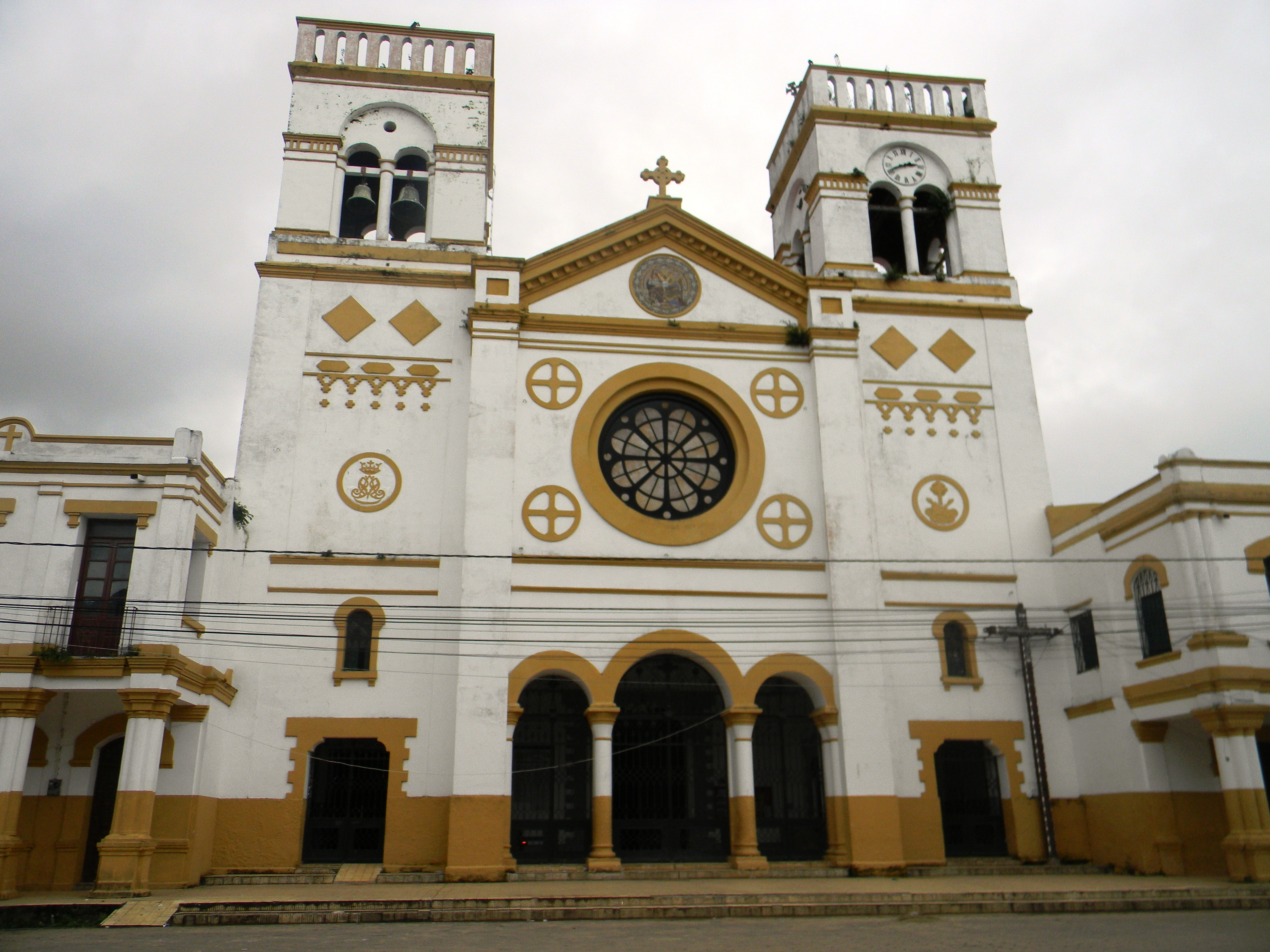 Catedral de la Santísima Trinidad en Trinidad, Beni, Bolivia. This medium shows the protected monument with the number B/00-001 in Bolivia.